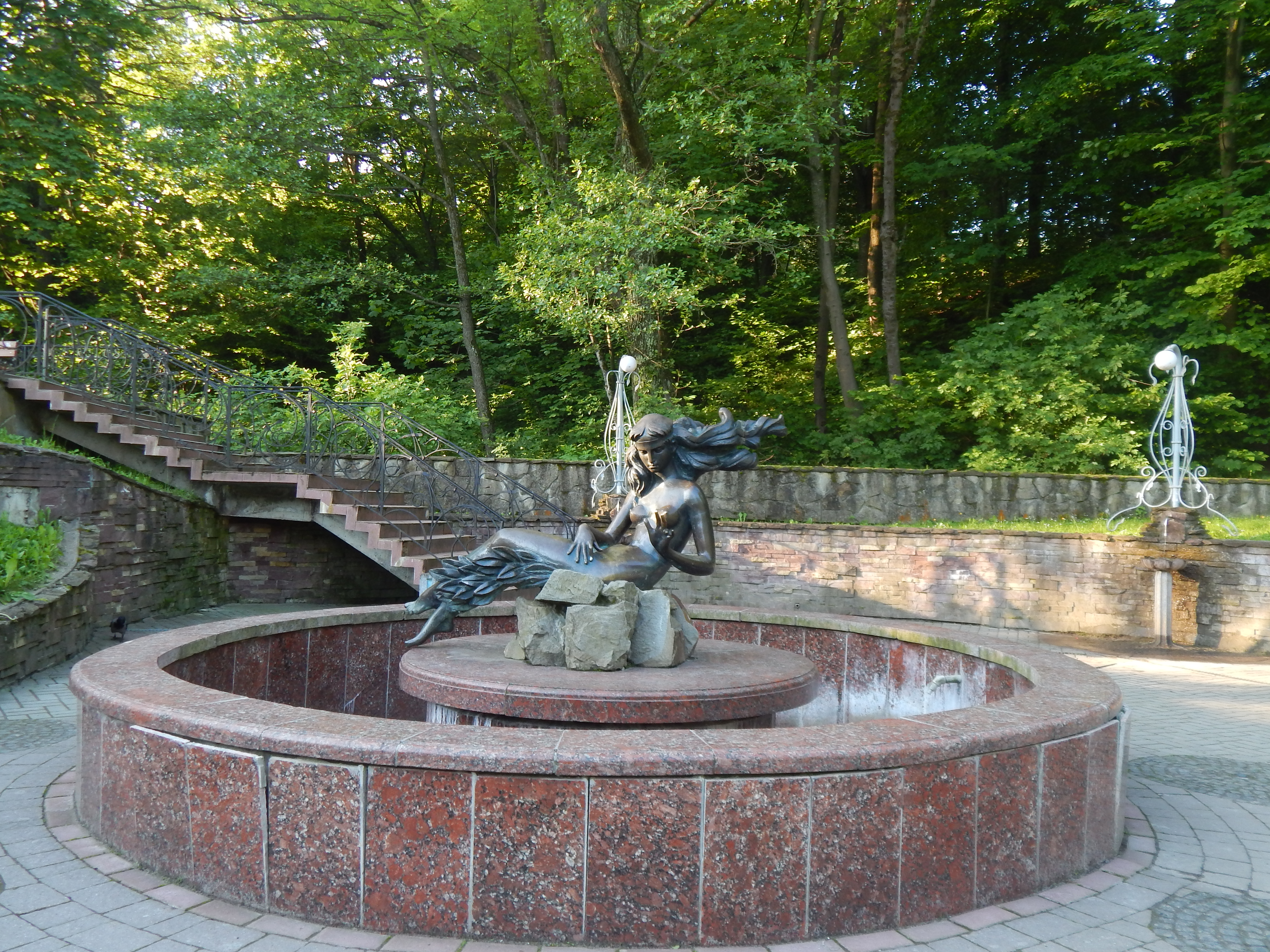 Джерело № 11 (колишня «Юзя») курорту «Трускавець», м. Трускавець